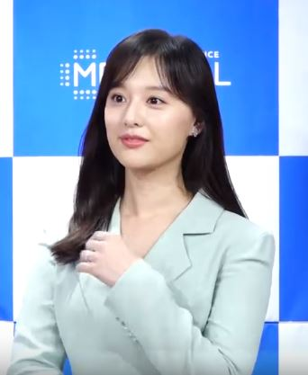 배우 김지원이 28일 오후 서울 명동 메디힐 플래그십 스토어에서 열린 글로벌 마스크팩 브랜드의 신제품 출시 기념행사에 참석했다.